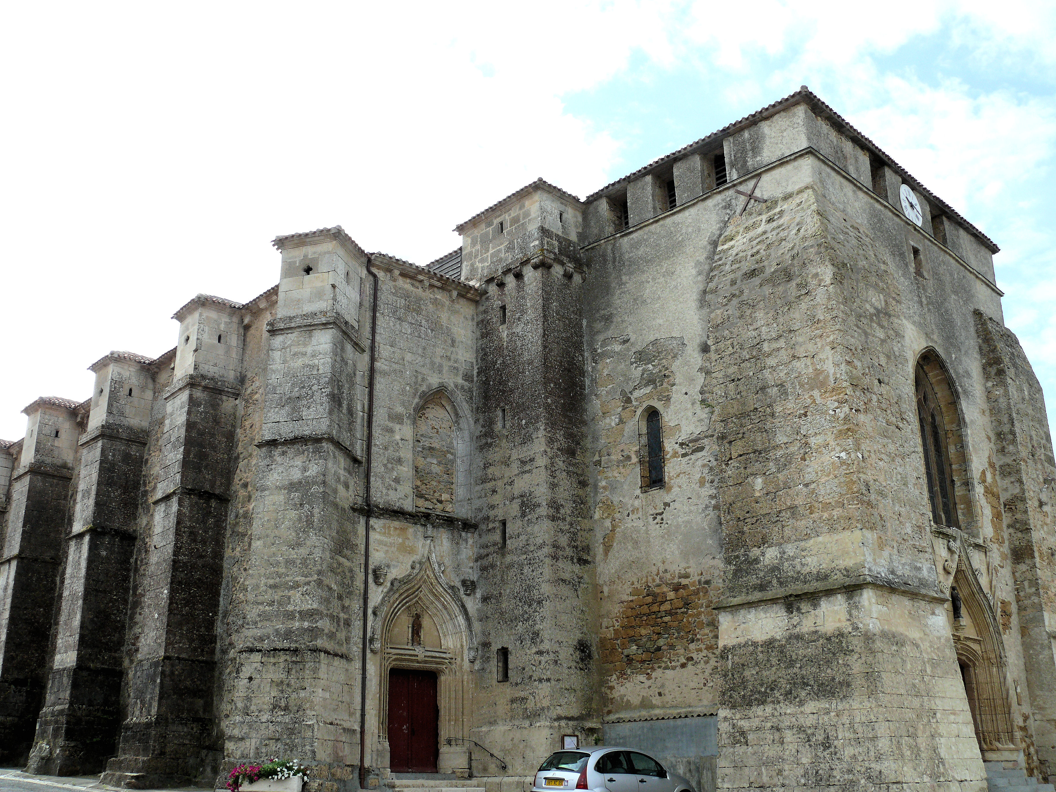 Cheffois - Eglise Saint-Pierre